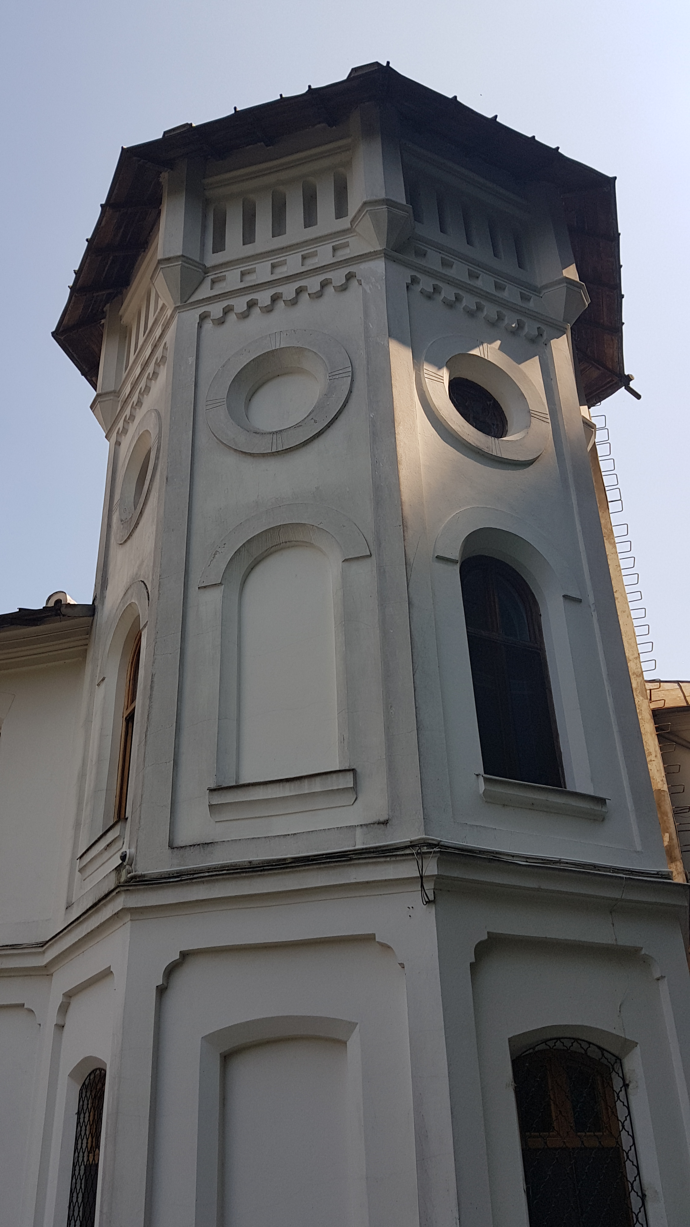 Incintă cu turnuri de colț 06